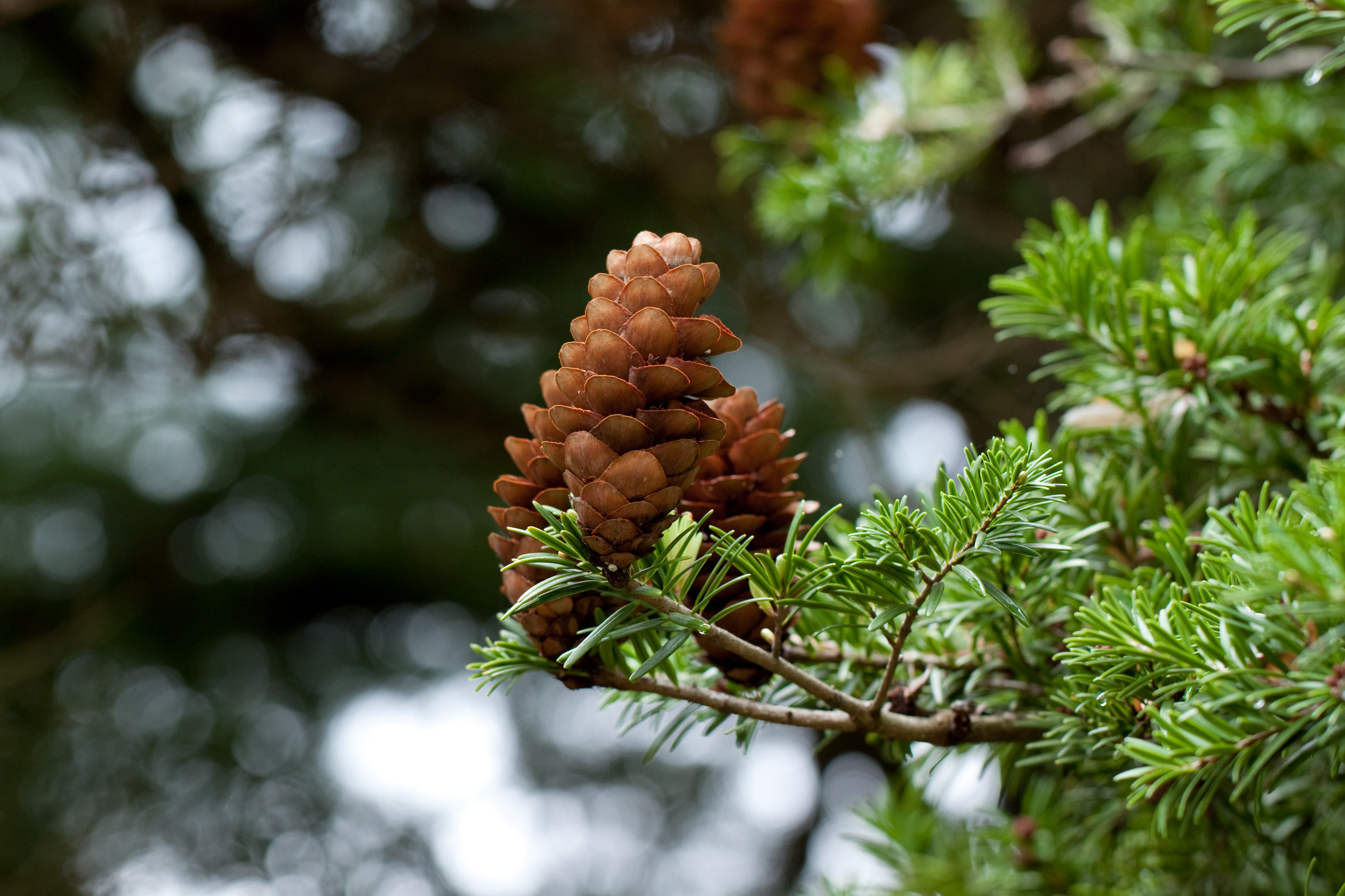 シマモミ。島樅。 Keteleeria davidiana var. formosana, Kyoto botanical garden.